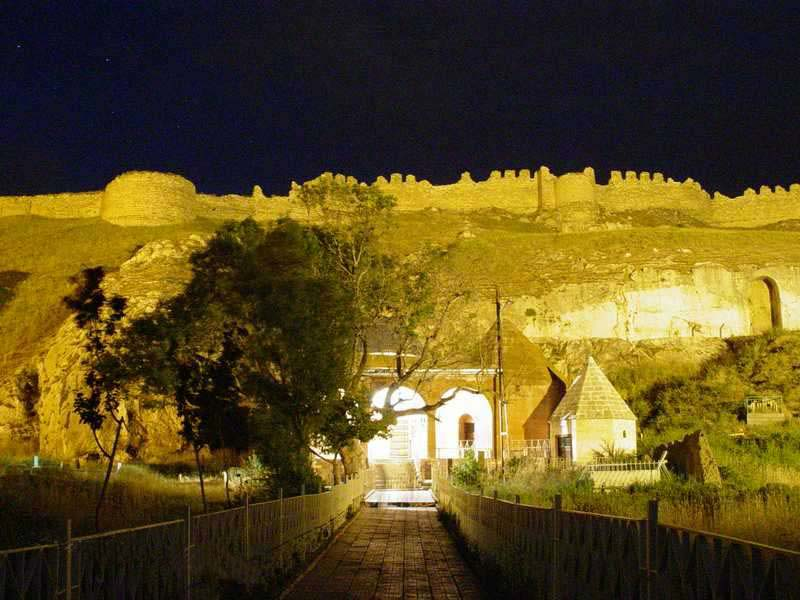 Kişisel Resim göl gevaş